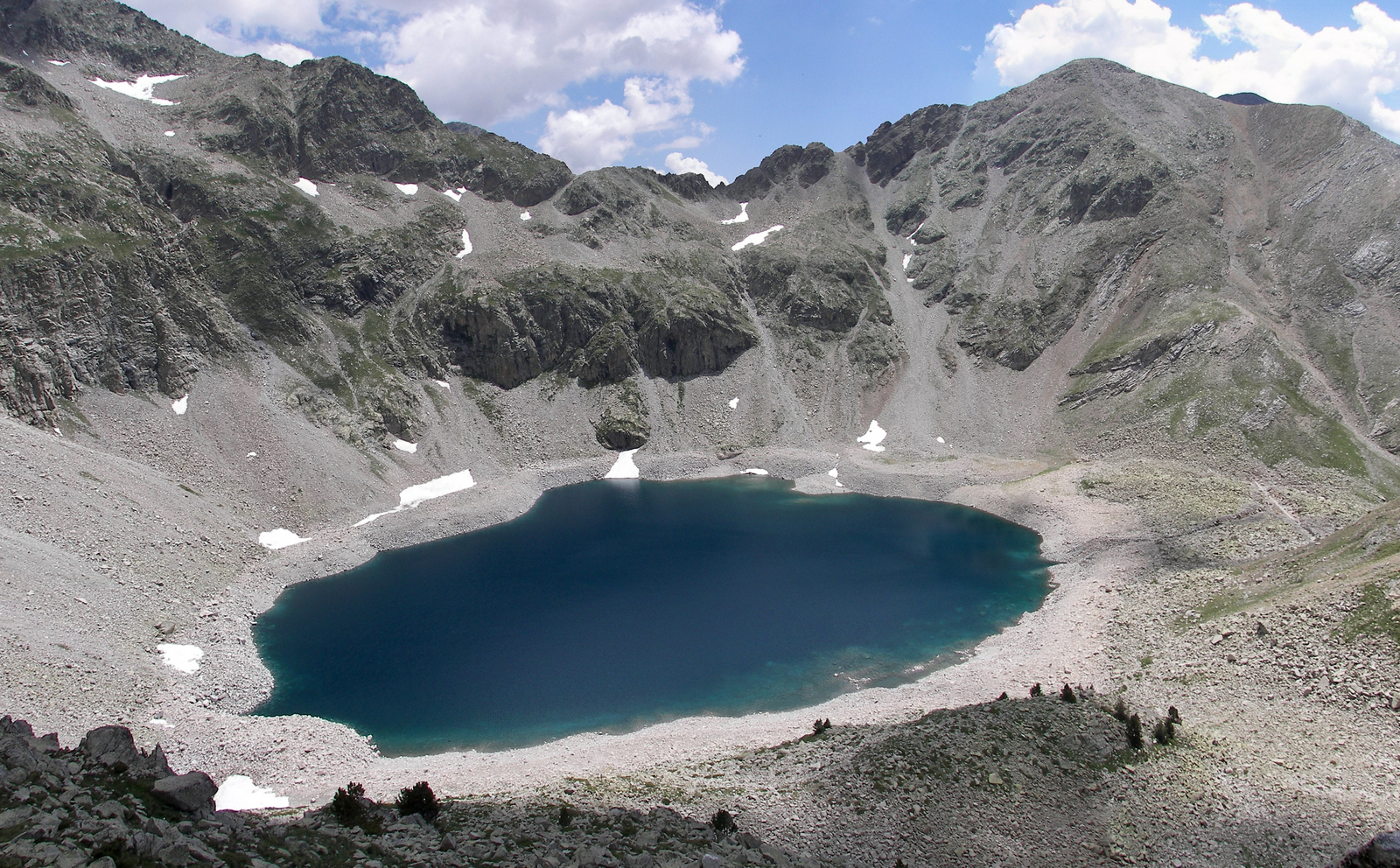 Parque natural Posets-Maladeta This is a photography of a Site of Community Importance in Spain with the ID: ES0000149. Natura2000 entry, EEA entry